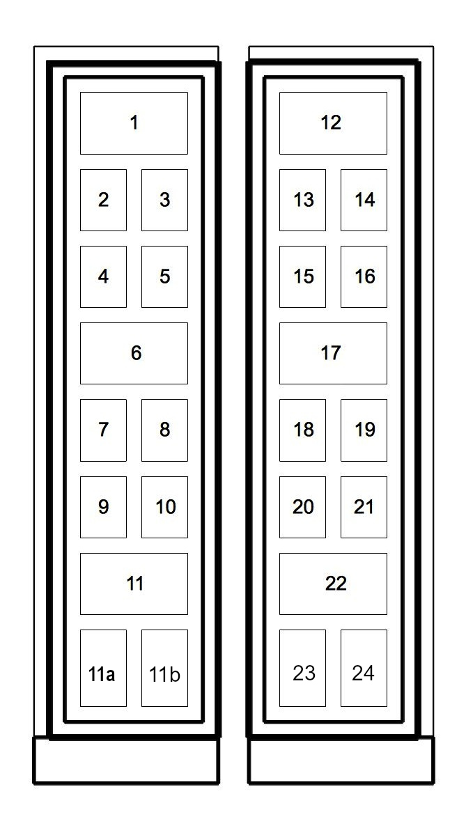 Raster und Anordnung der Tafeln mit Beschriftung